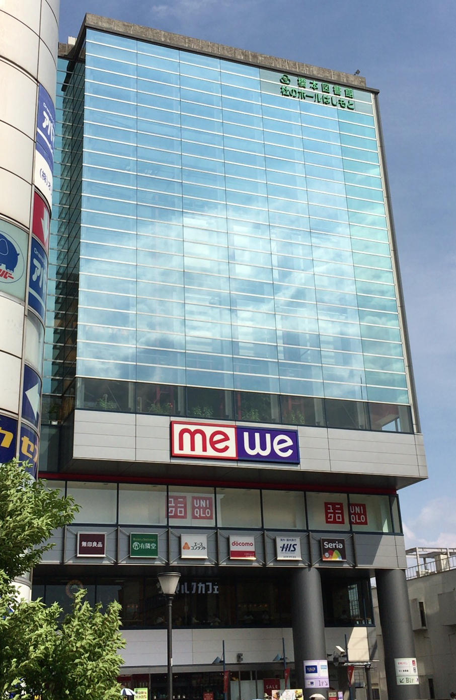 相模原市立橋本図書館が入った商業ビル「ミウィ」